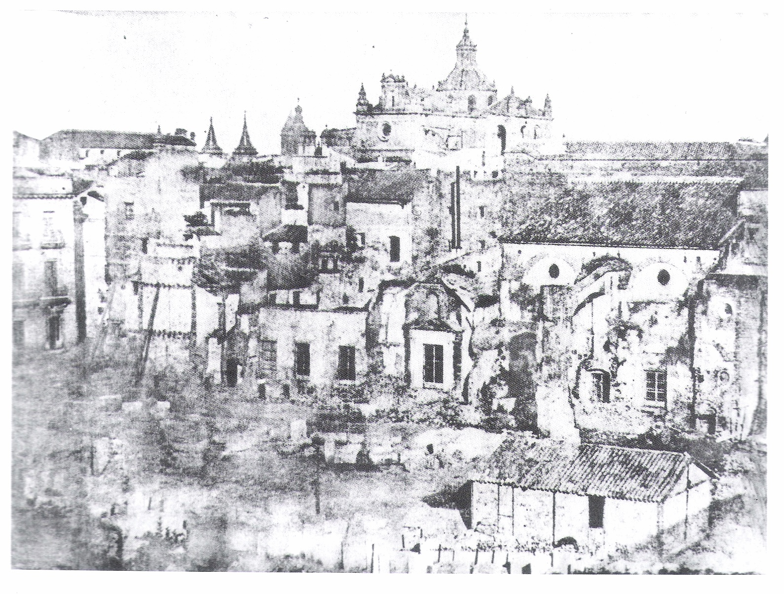 Derribo del convento de San Francisco. Goma bicromatada. 28x18 cm.